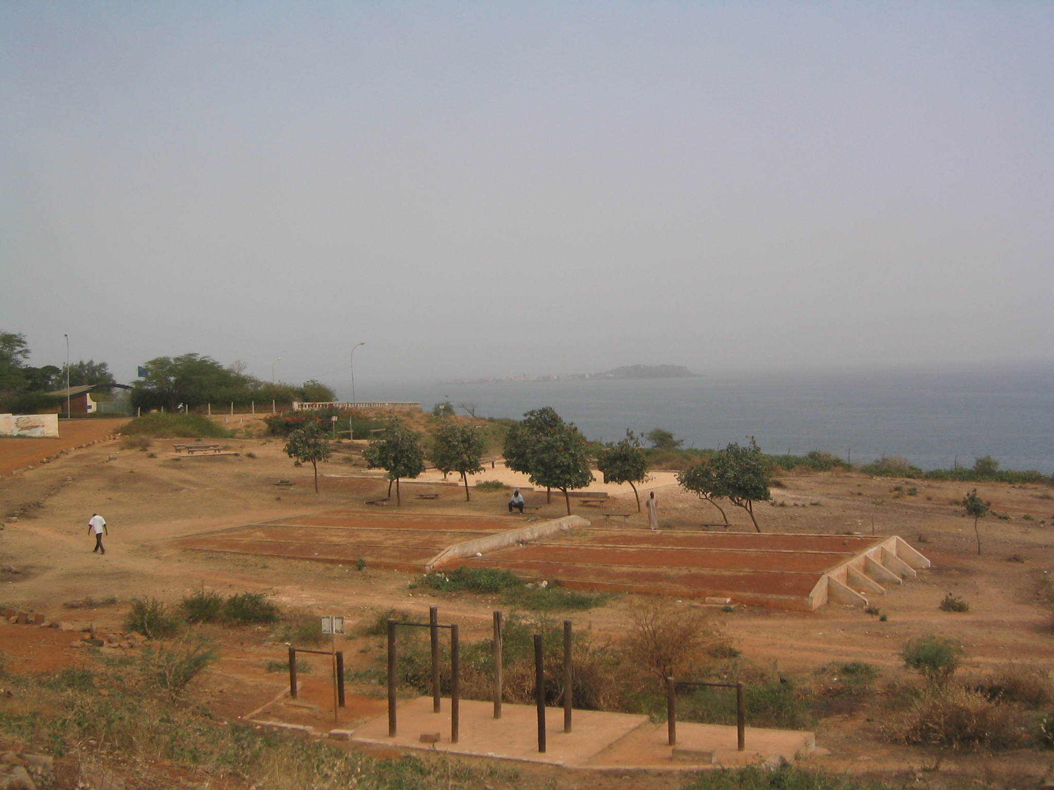 Vue depuis le Cap Manuel (Sénégal) - Au loin, l'île de Gorée